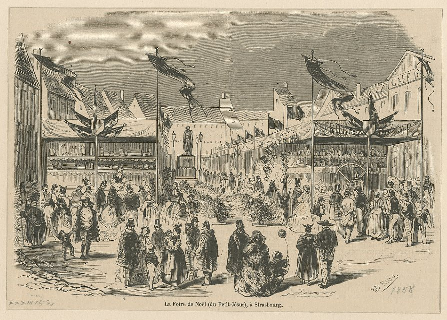 Édouard Riou, Christkindelsmärik place Kléber. Gravure du journal Le Monde Illustré n° 38 du 2 janvier 1858.